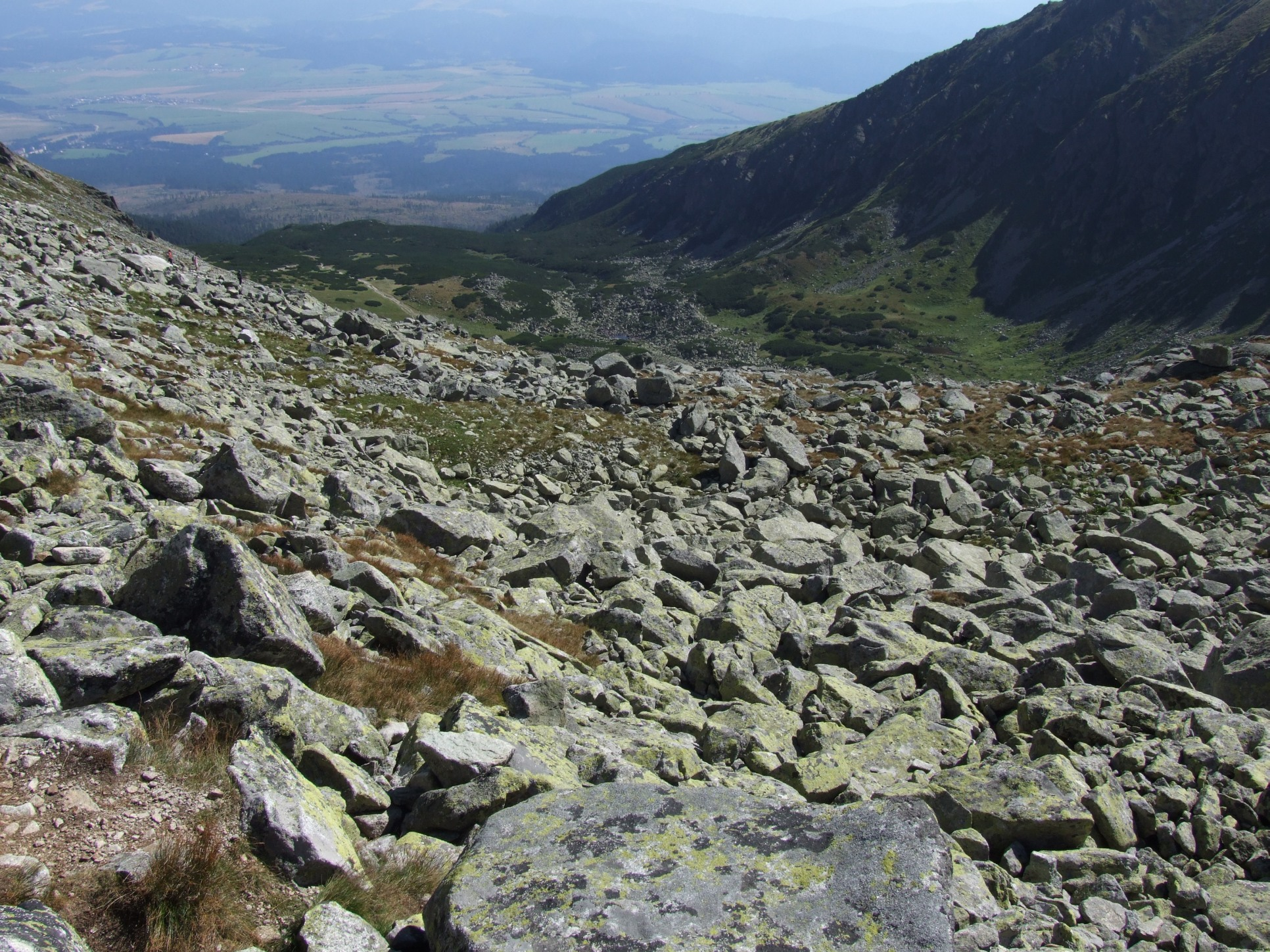 Dolina Furkotna (Tatry Wysokie)